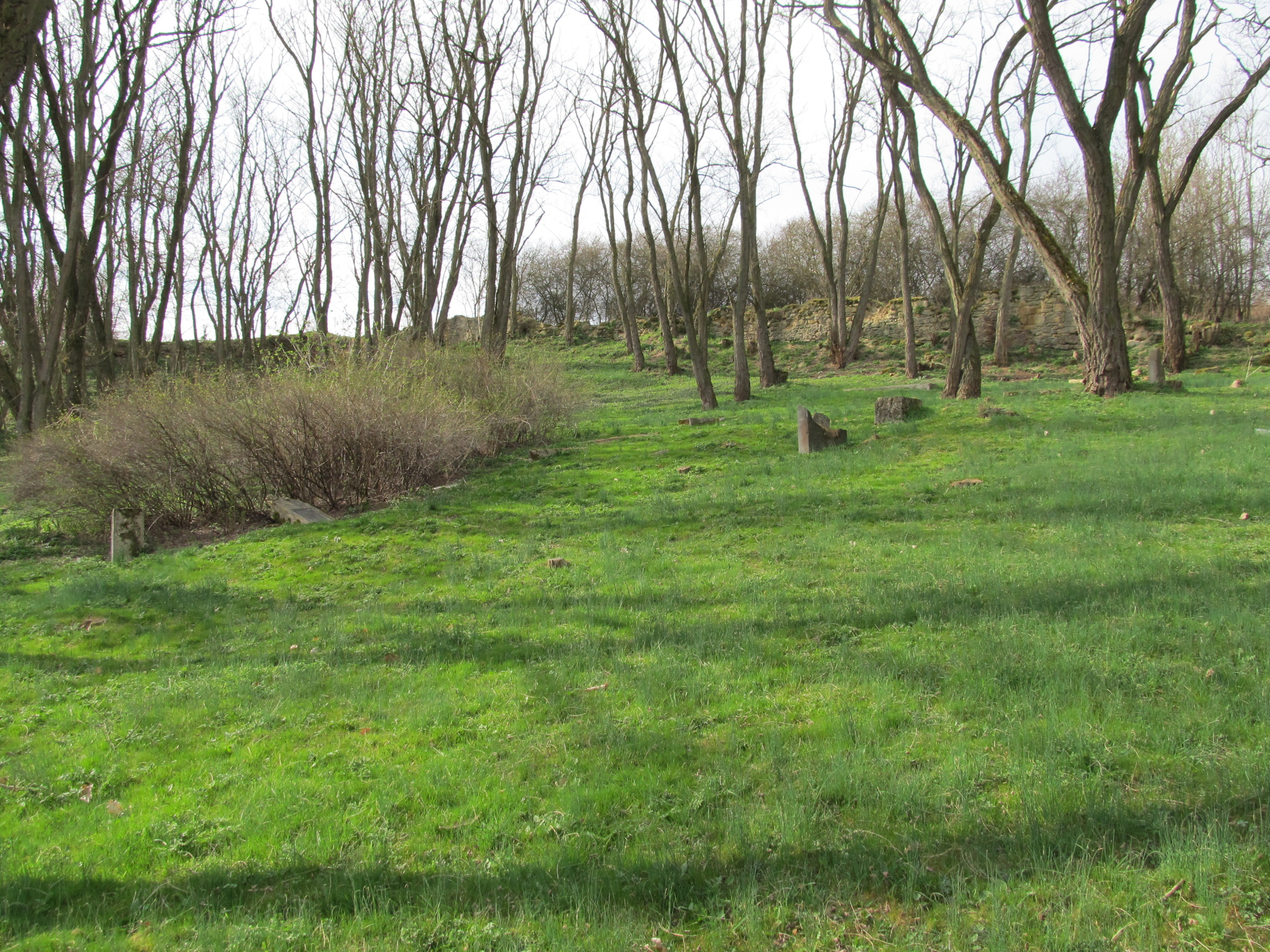 Město Touškov ŽH